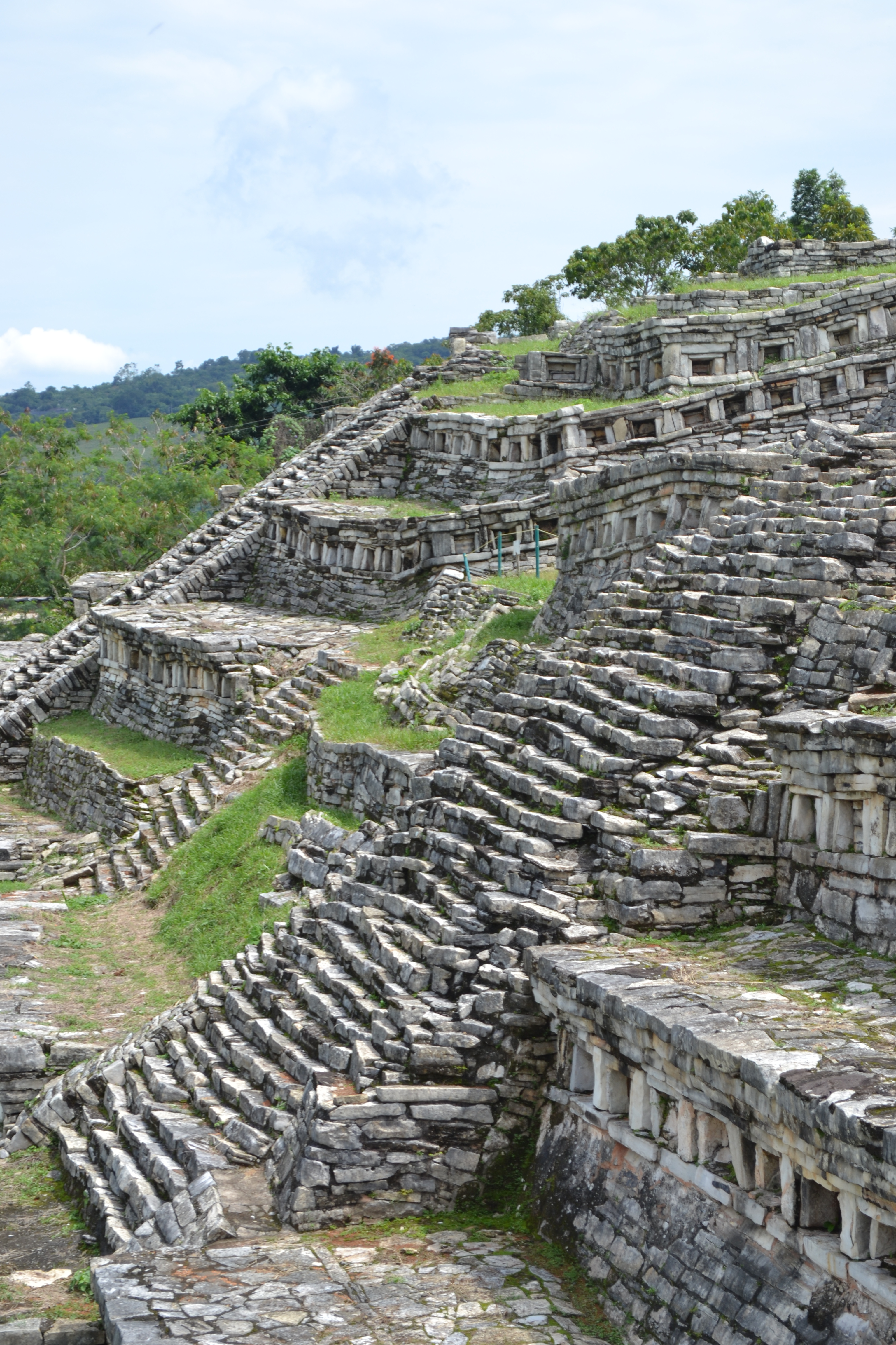 Vista de las escalinatas de Yohualichan, Ciudad_de_Cuetzalan, Puebla.